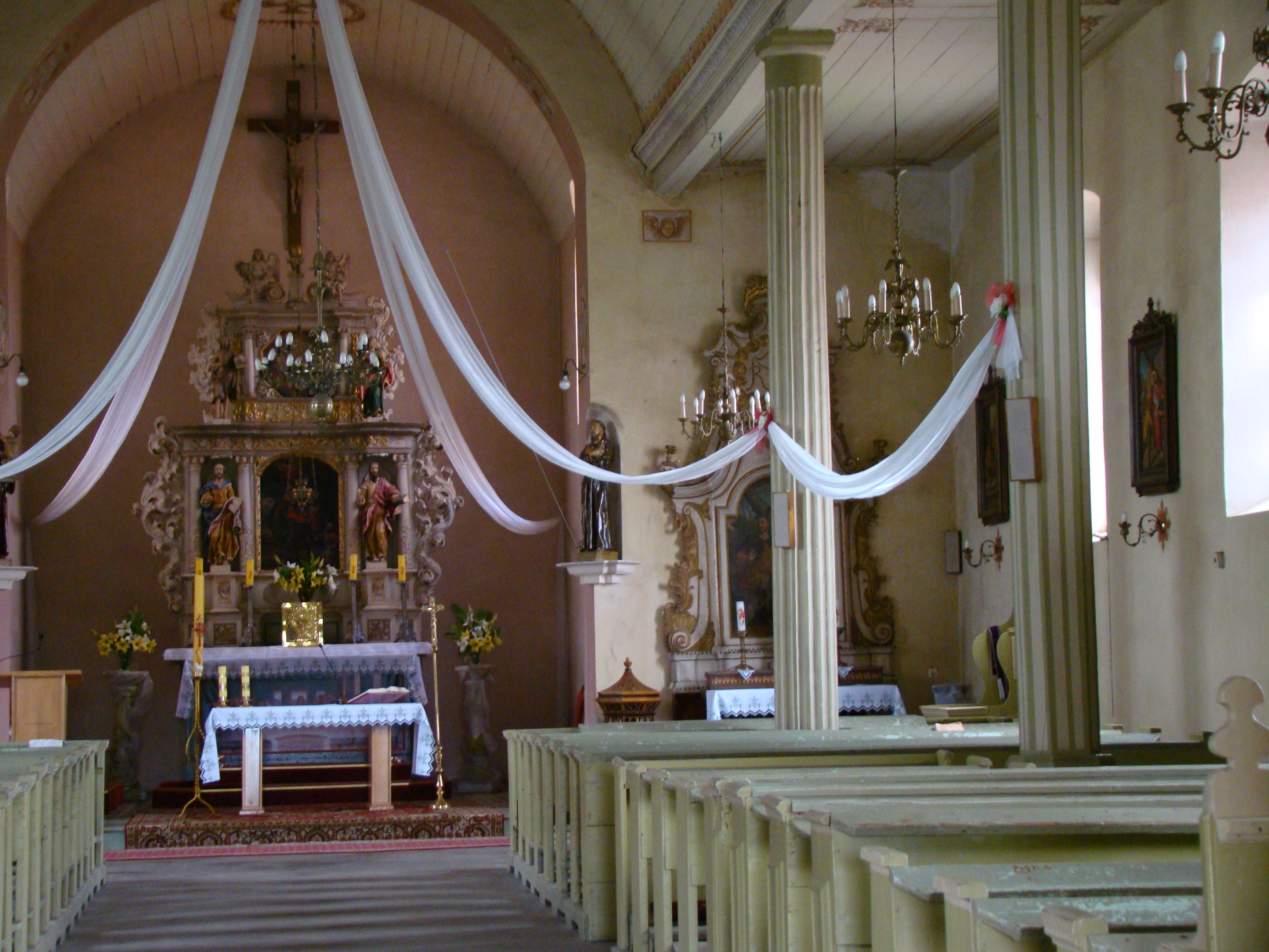 Jesionowo - rzymskokatolicki kościół parafialny p.w. św. Marcina, 1649-1684, 1911